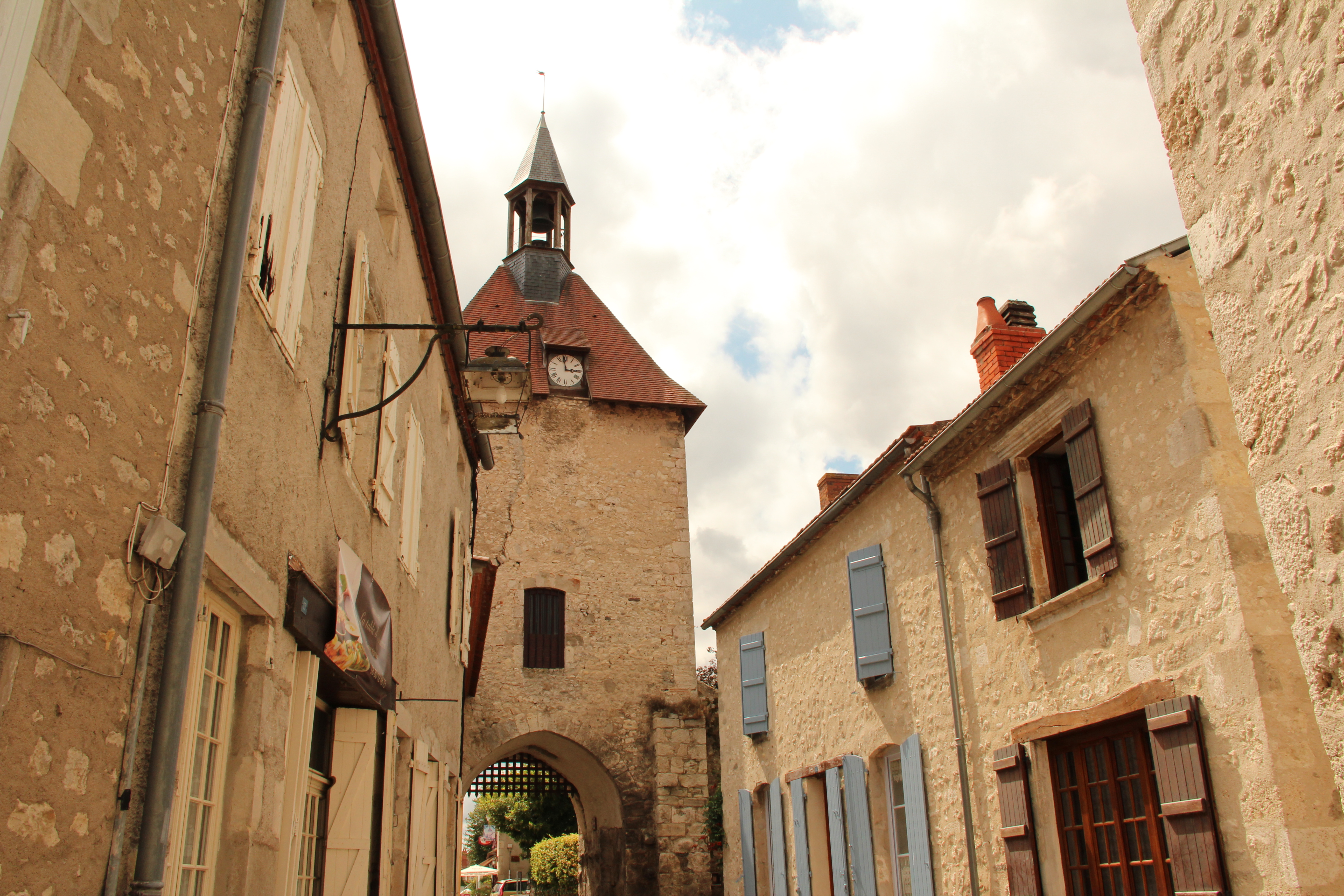 Rue de Charroux